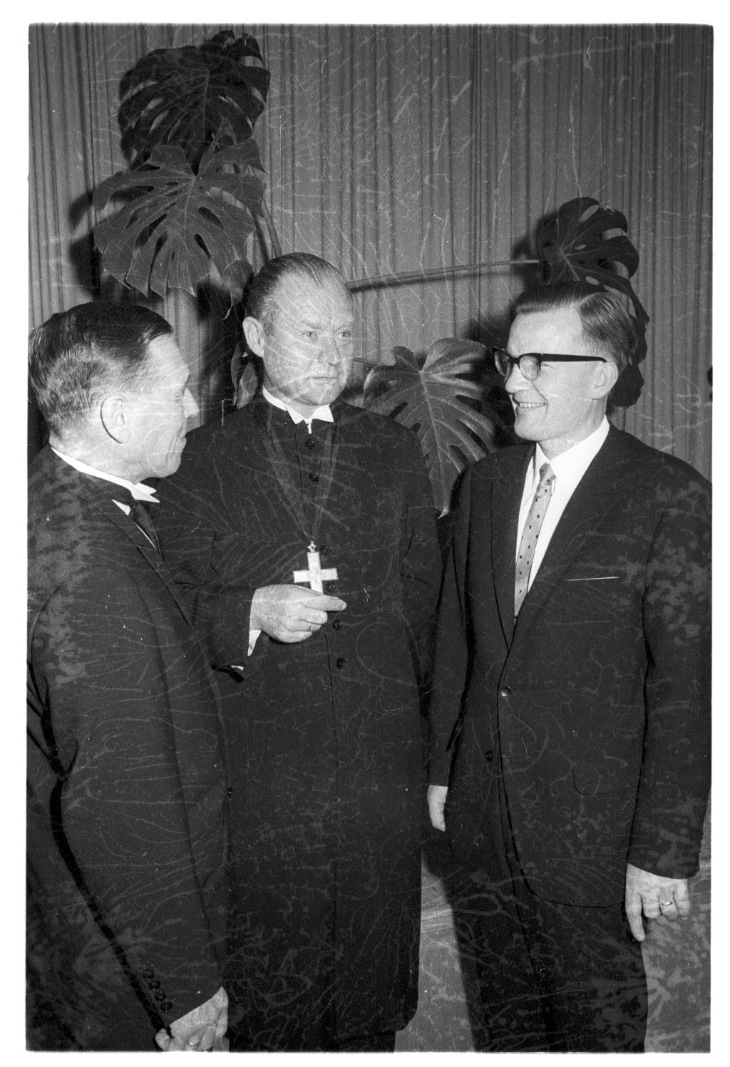 V.r.: Ausscheidender Pastor Ernst Scharrenberg, Propst Bertold Kraft und Pastor Wilhelm Sievers.